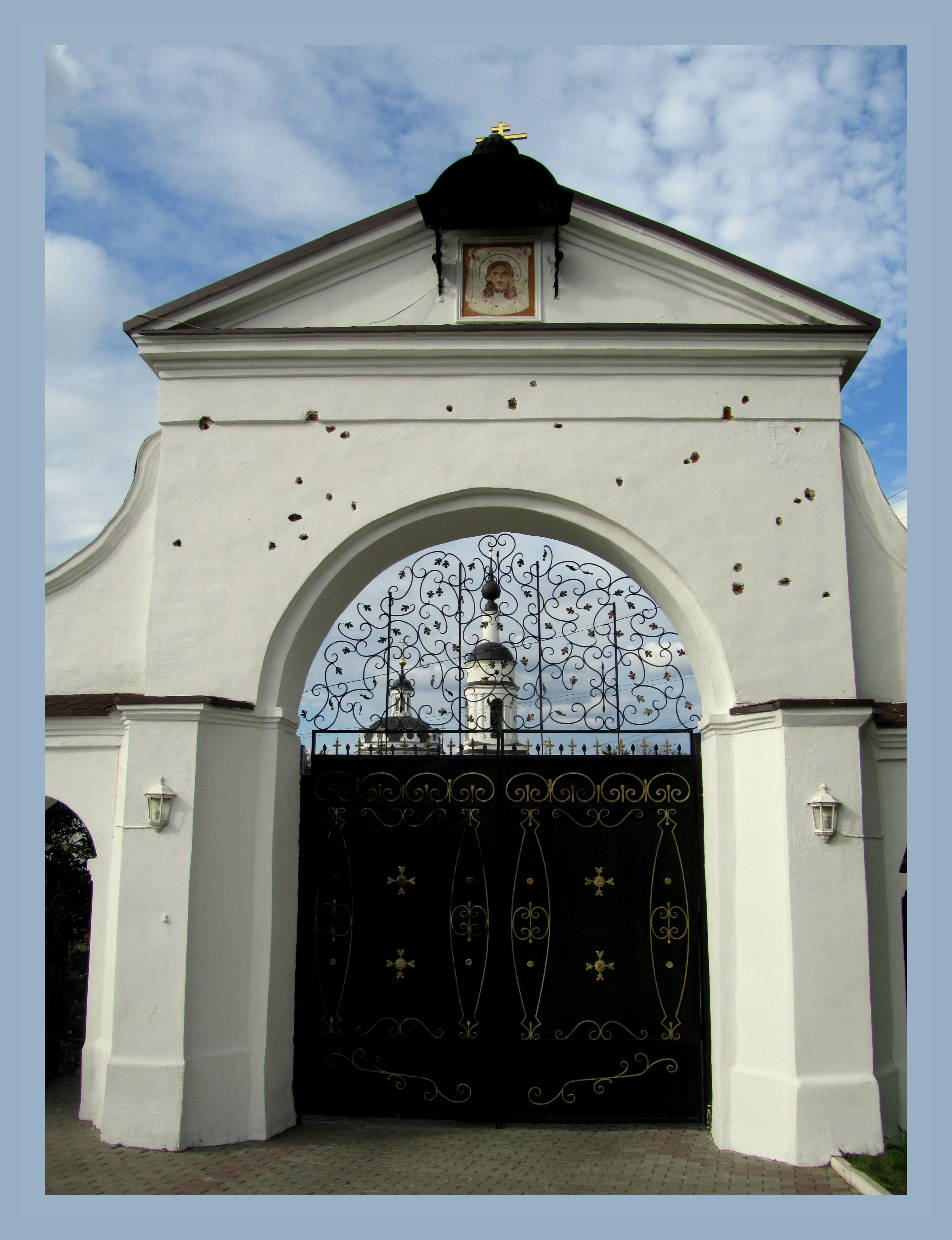 Ворота Голубые: Кутузова ул., Малоярославец, Малоярославецкий район, Калужская область